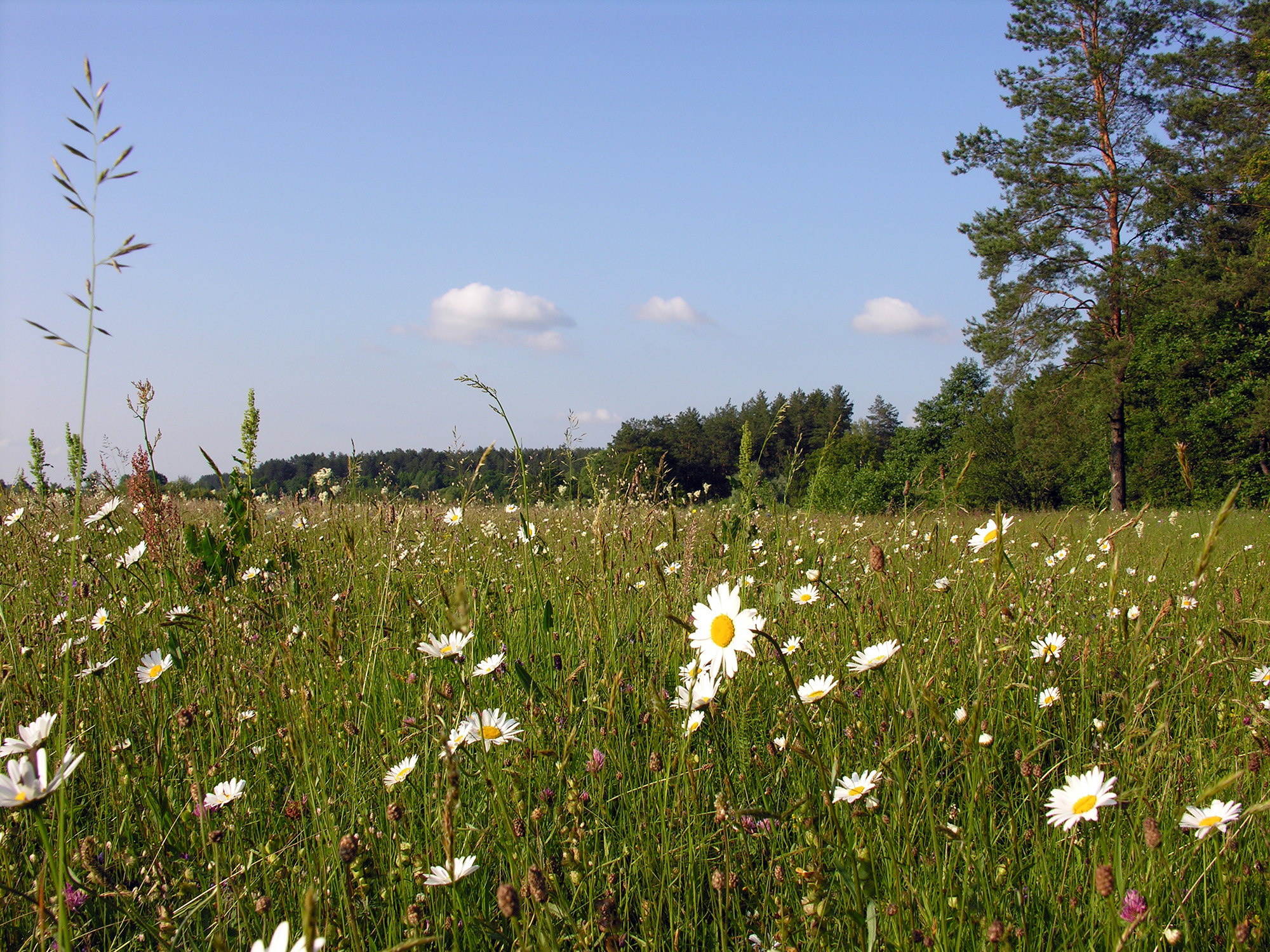 «Деснянсько-Старогутський», Середино-Будський р-н: Зноб-Трубчевська, Старогутська, Стягайлівська, Очкинська, Нововасилівська, Кривоносівська, Кренидівська с/р; ДП «С.-Будський агролісгосп»: кв. 1-10, 12-14, 18, 20, 21 (вид. 1-11, 17), 22, 23 (вид. 1-12, 19), 51, 52 (вид. 10-46), 53, 76-77, 78 (вид. 1-27), 80 (вид. 1-22), 81 (вид. 23), 29, 31 (вид. 1-13, 17-41)